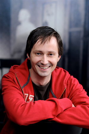 Jaroslav Plesl (nar. 1974) je český herec.